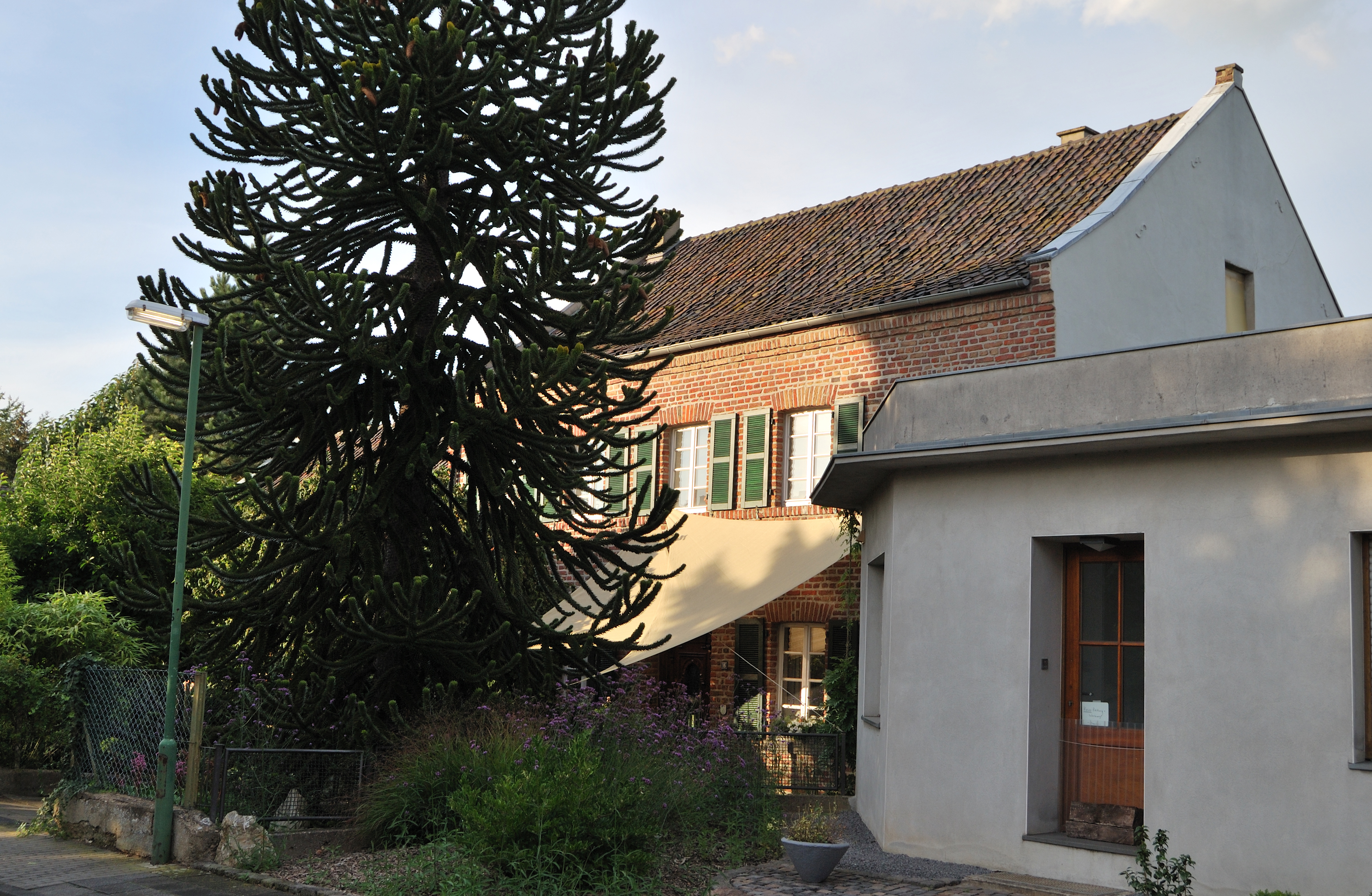 In der Mitte 16; Denkmalnummer 109